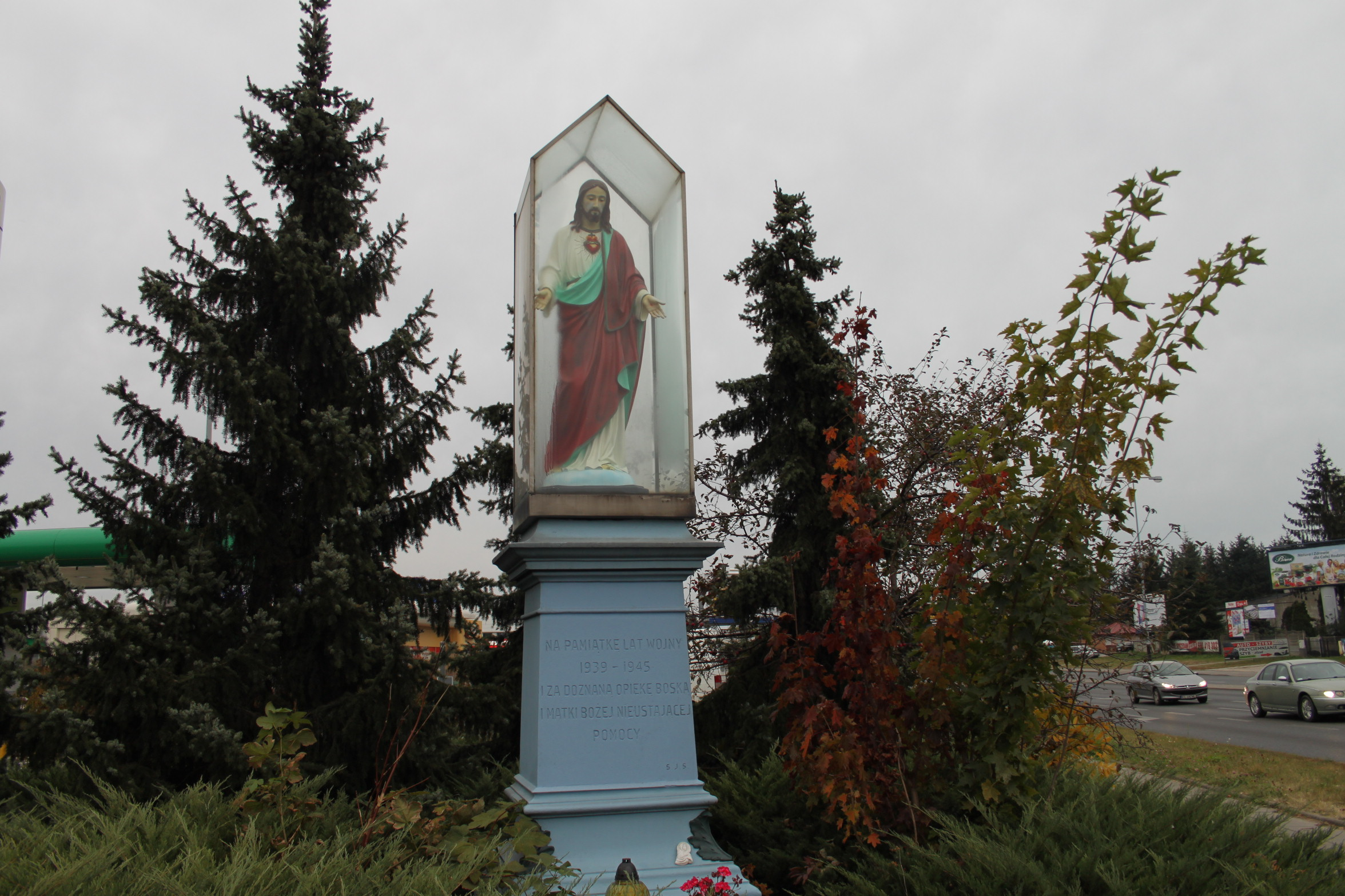 Kapliczka stojąca na rogu ulicy Rzgowskiej i Kolumny w łodzi